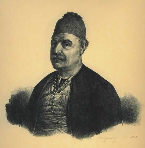 Andreas Vokos (Miaoulis) (1768 - 24 June 1835), Greek admiral and politician, who commanded Greek naval forces during the Greek War of Independence. Ανδρέας Μιαούλης Andreas Vokos Miaoulis Lithography by Karl Krazeisen (1794-1878) from "Bildnisse ausgezeichneter Griechen und Philhellenen nebst einigen Ansichten und Trachten. Nach der Natur gezeichnet und herausgegeben von Karl Krazeisen. Munchen 1831".